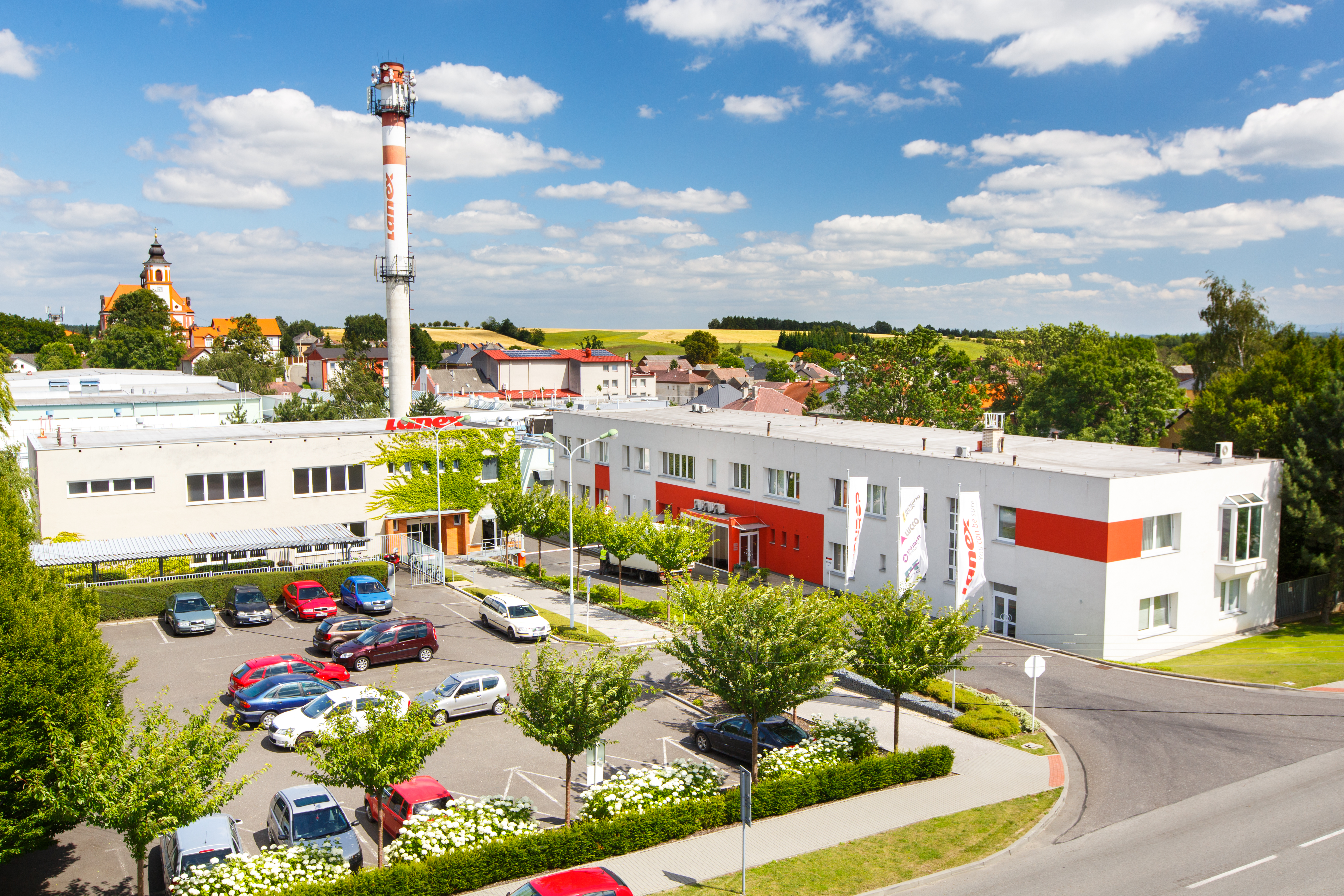 Snímek sídla firmy LANEX a.s., Bolatice.